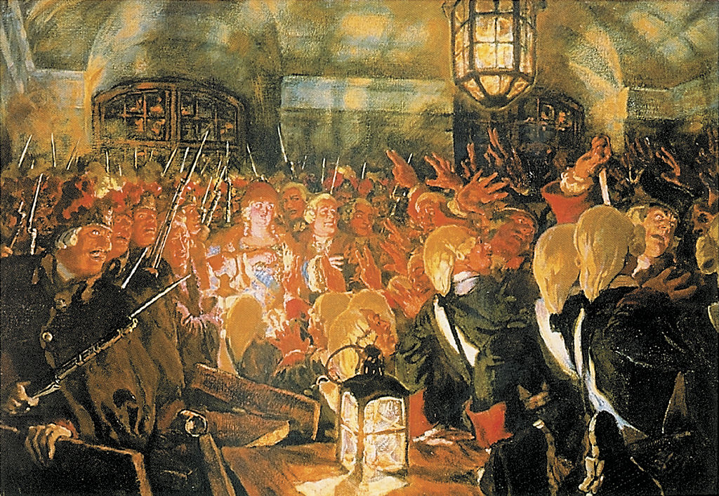 «Цесаревна Елизавета Петровна в кордегардии Зимнего дворца»